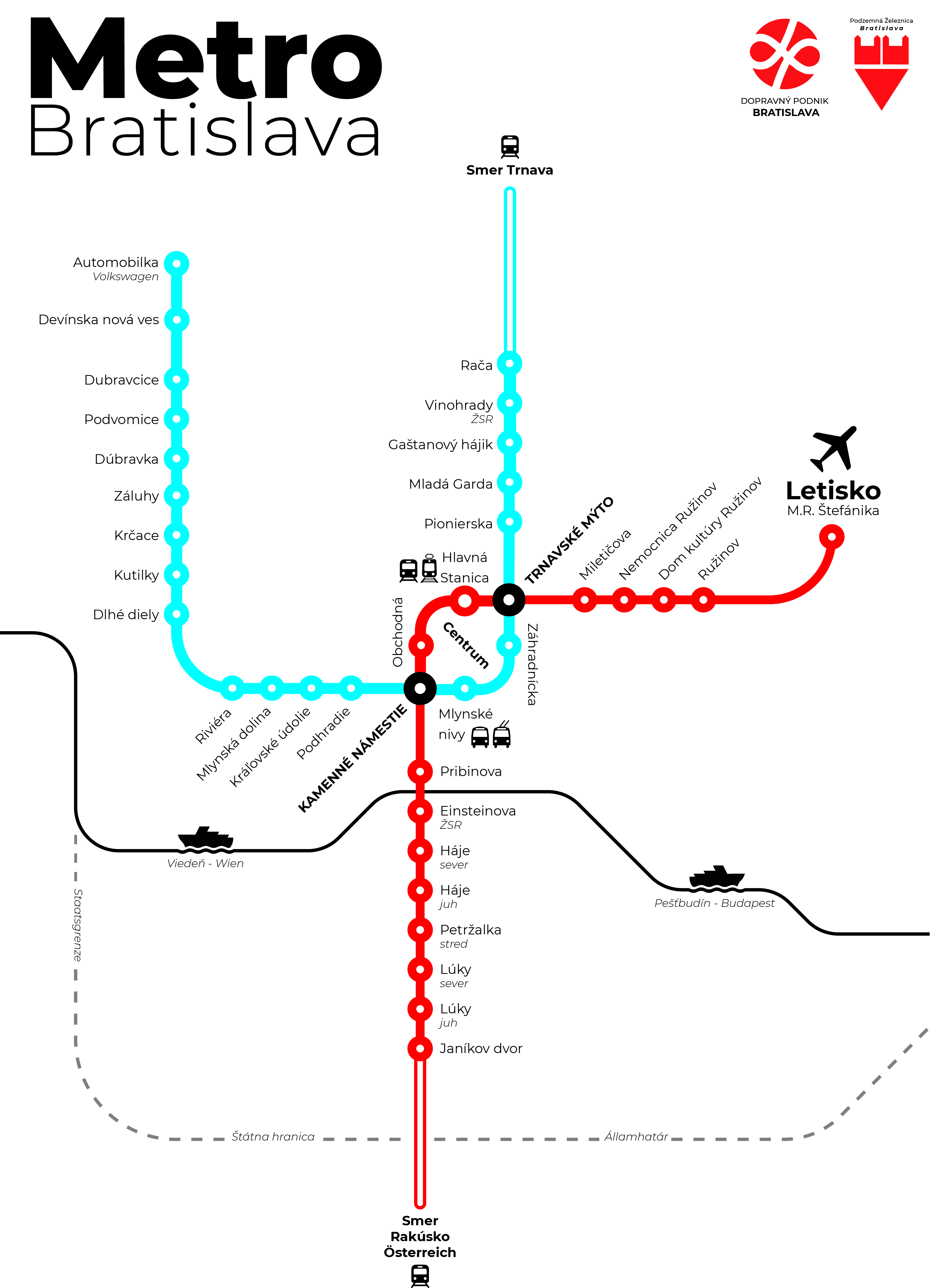 Moderny dizajn mapy Bratislavského metra.